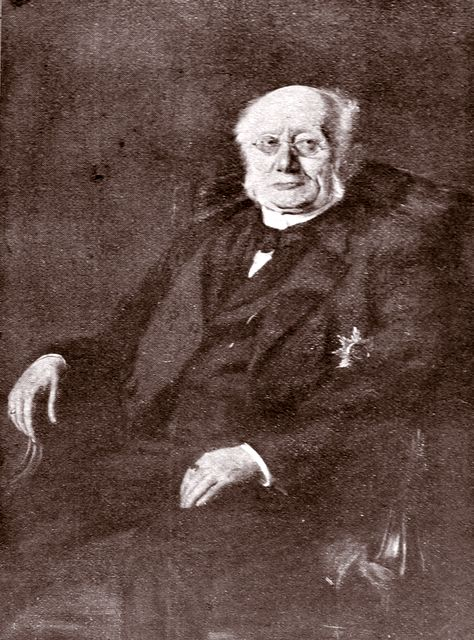 Ludwig Windthorst, Mitbegründer der Deutschen Zentrumspartei